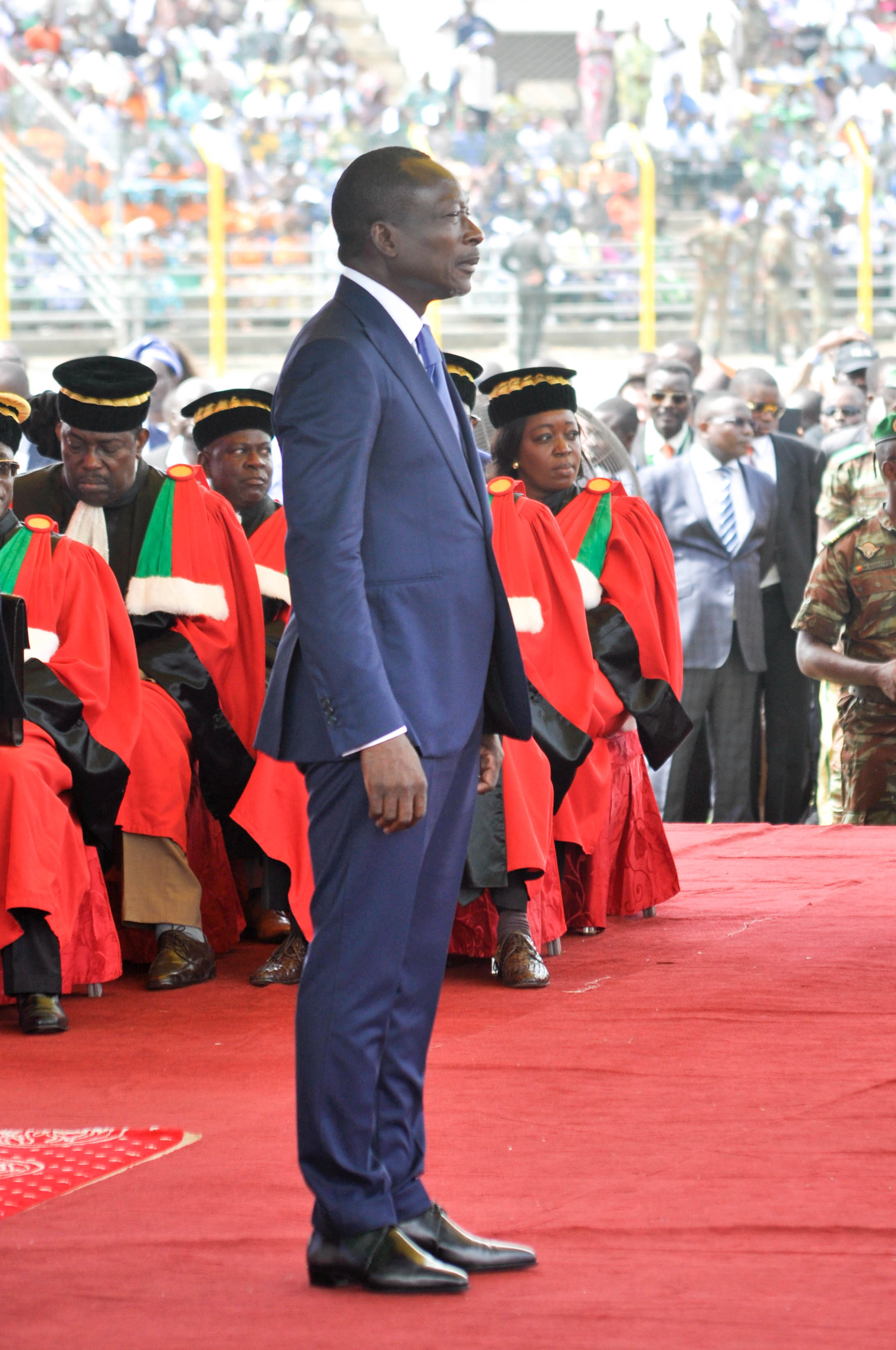 Photo prise au Stade Charles de Gaulle